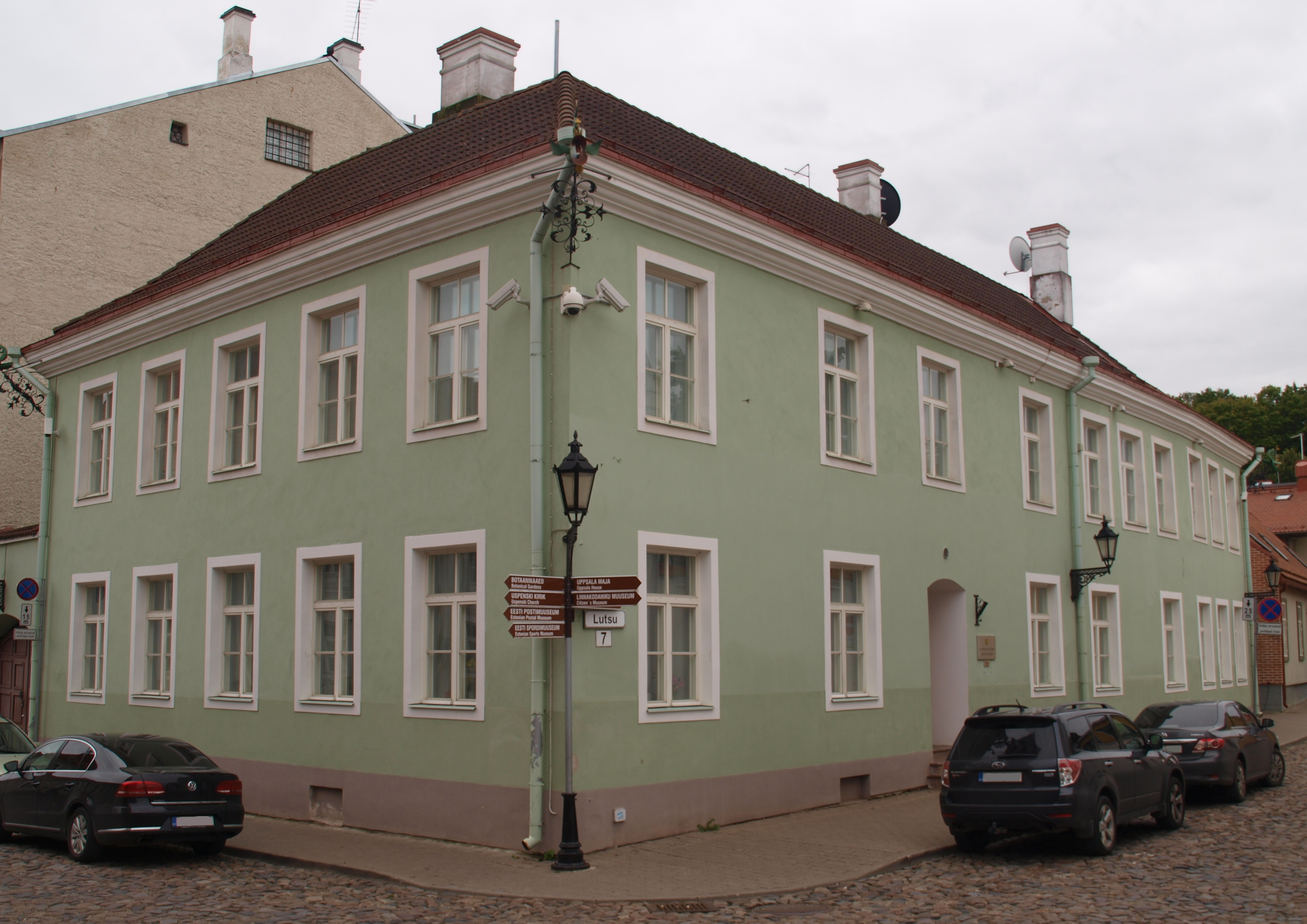 Elamu Tartus Lutsu 7/ Jaani 10, 18.saj. Täna asub seal Kaitsepolitsei Lõuna oskond